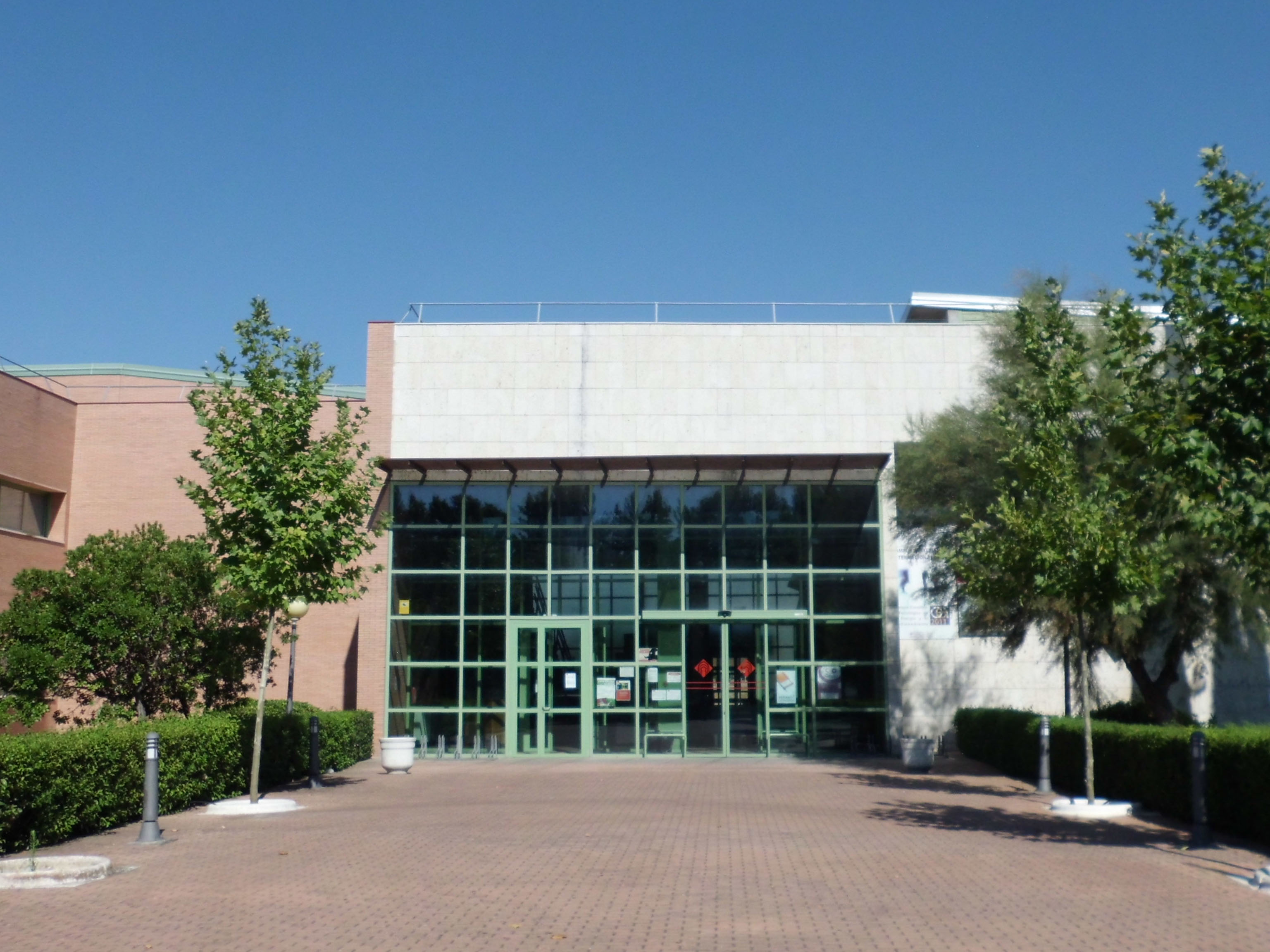 Entrada de la Universidad de Castilla La Mancha en Talavera de la Reina